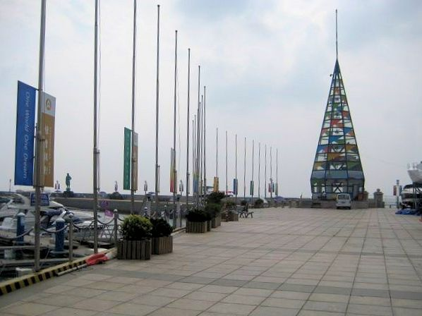 青岛奥林匹克帆船中心